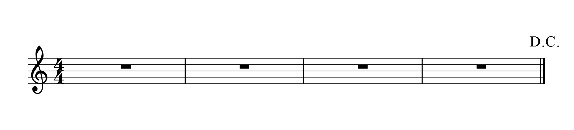 Hecho con MuseScore.